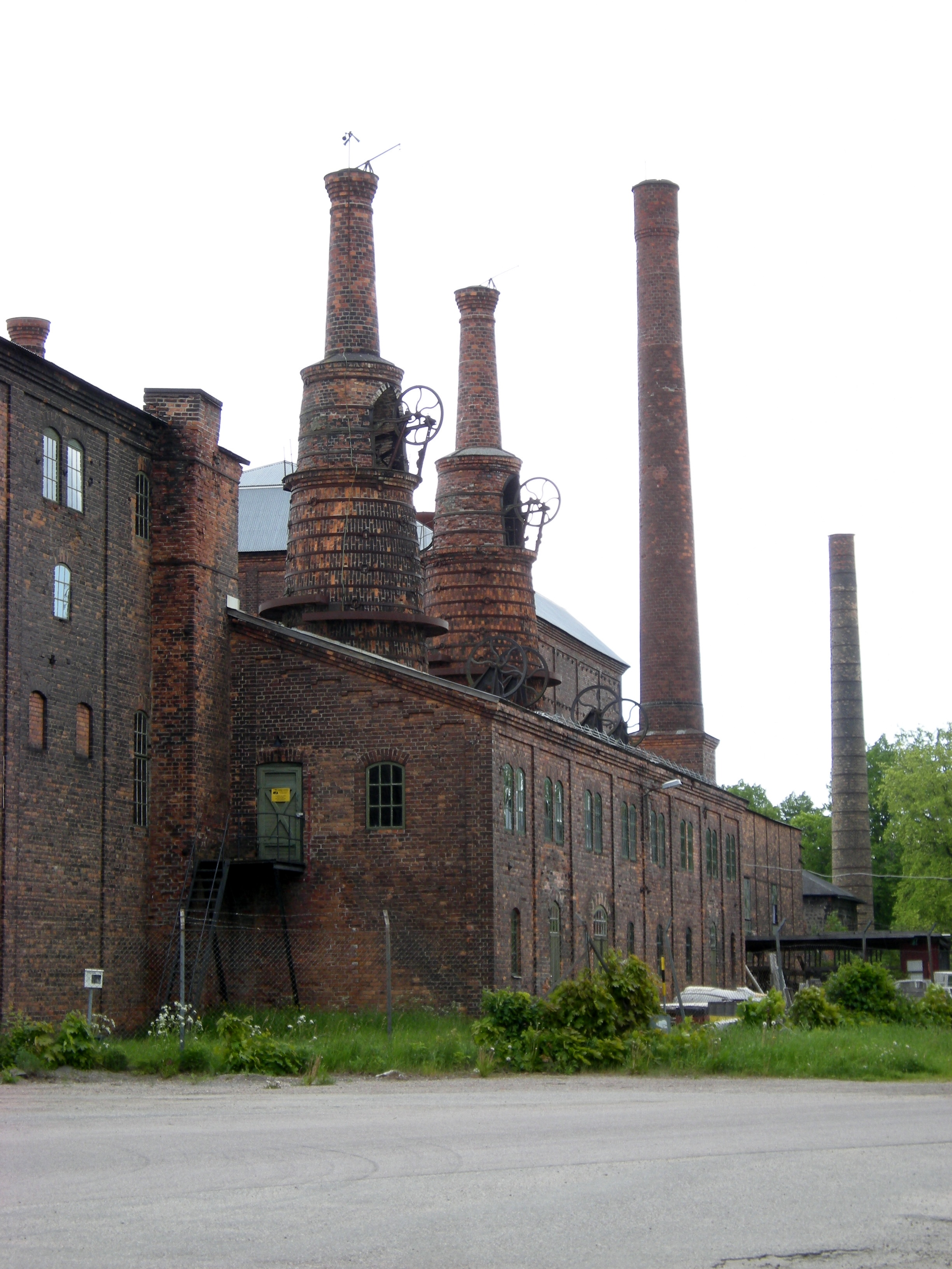 Forsbacka bruk.